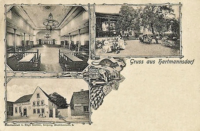 Historische Postkarte vom Gasthof "Zur Ratte" in Hartmannsdorf bei Leipzig